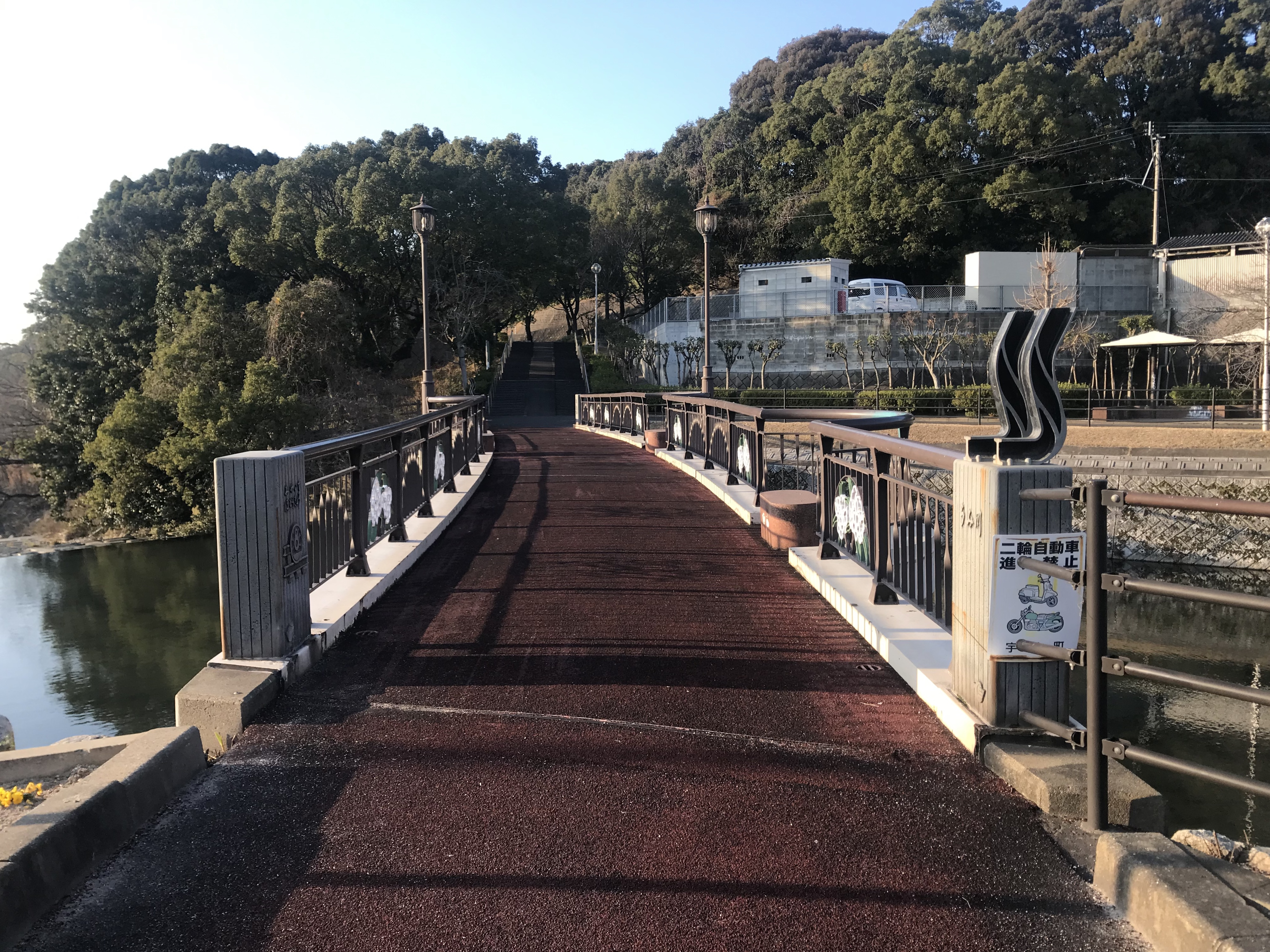 宇美川をまたぐ宮井手歩道橋(旧勝田線宇美川橋梁)